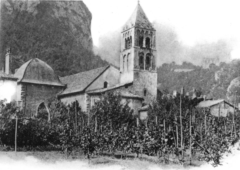 Carte postale (1900) de l'Église Saint-Pierre de Sassenage.